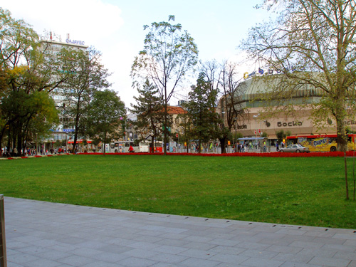 Blick auf den Park im Stadtzentrum Banja Lukas